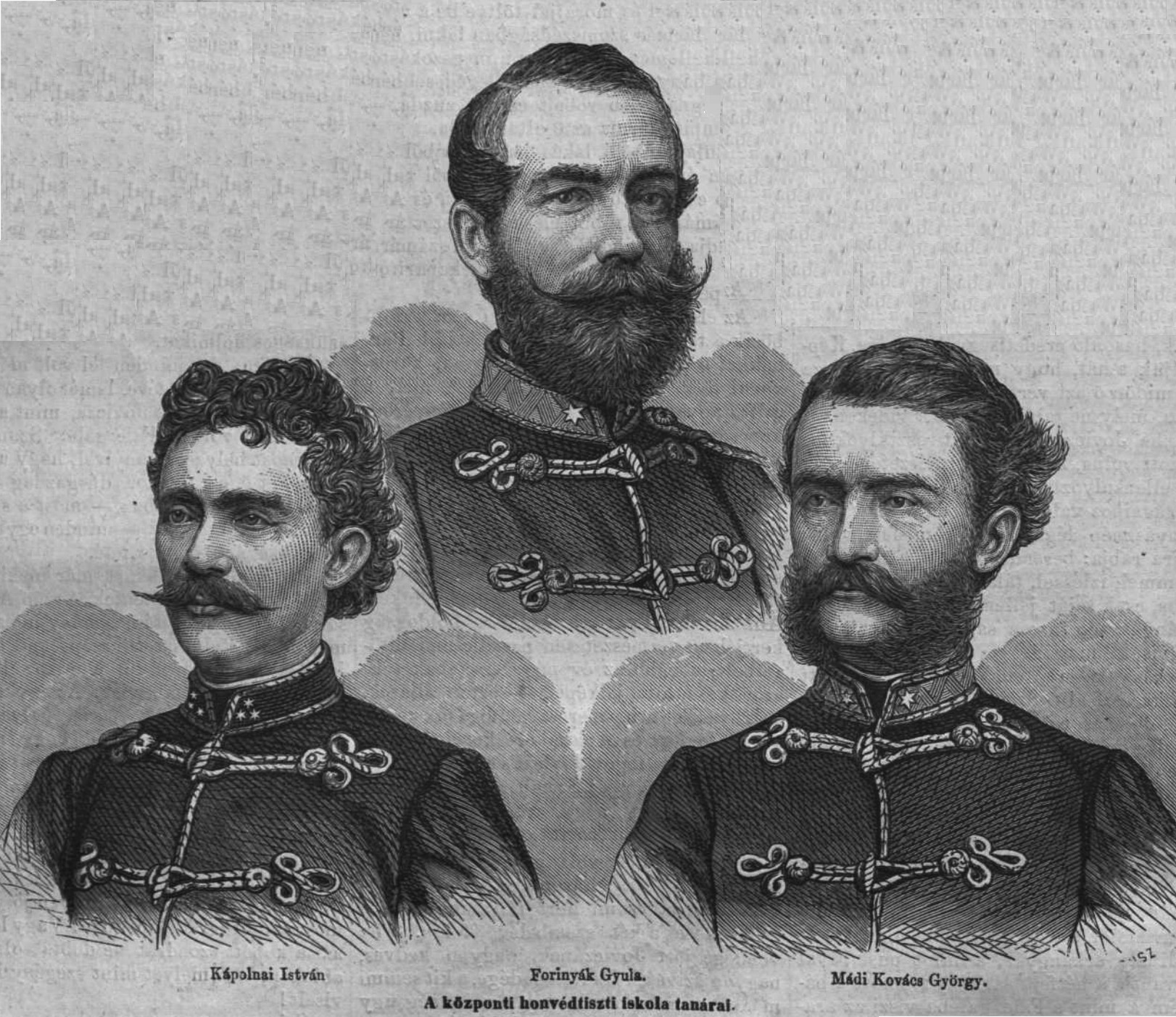 A Magyar Királyi Honvéd Ludovika Akadémia 3 tanára (1872); Forinyák Gyula - Kápolnai Pauer István - Mádi Kovács György